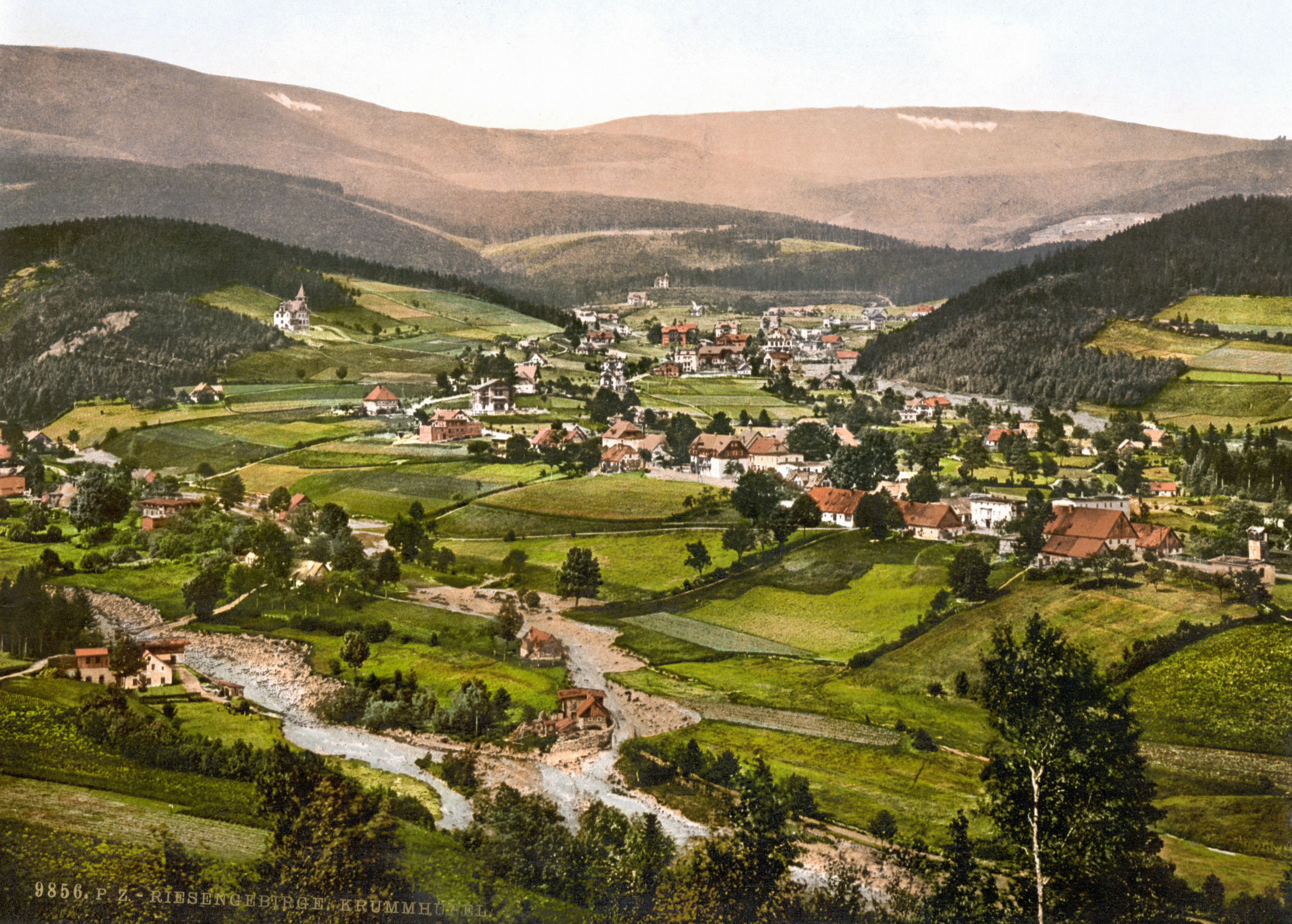 Krummhübel